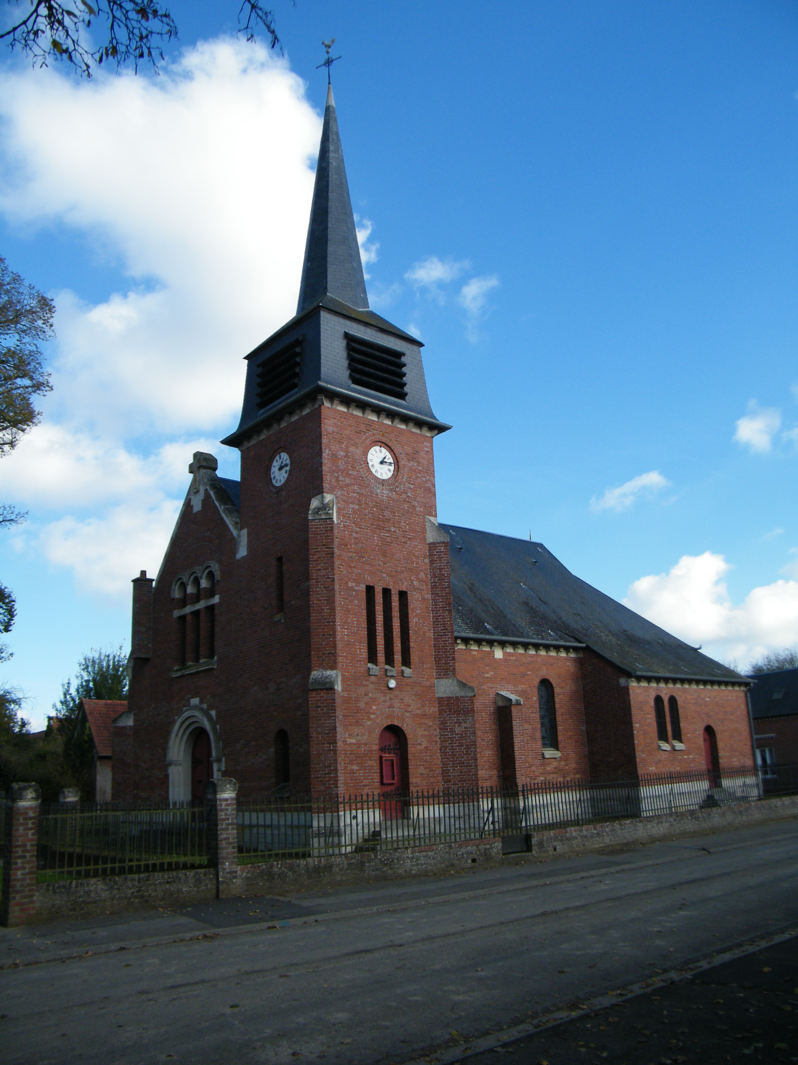 L'église.